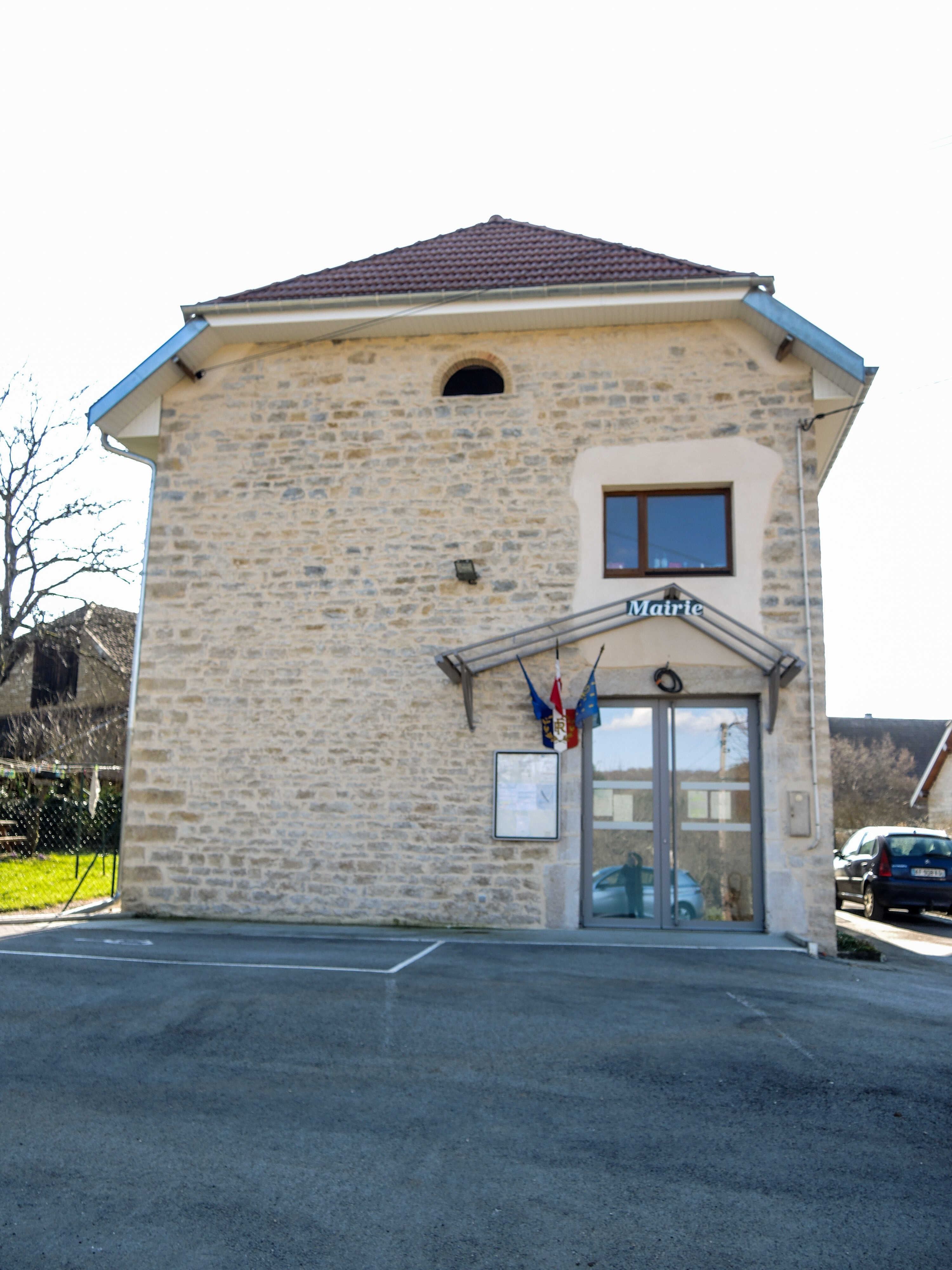 Mairie du village de Silley-Bléfond. Doubs